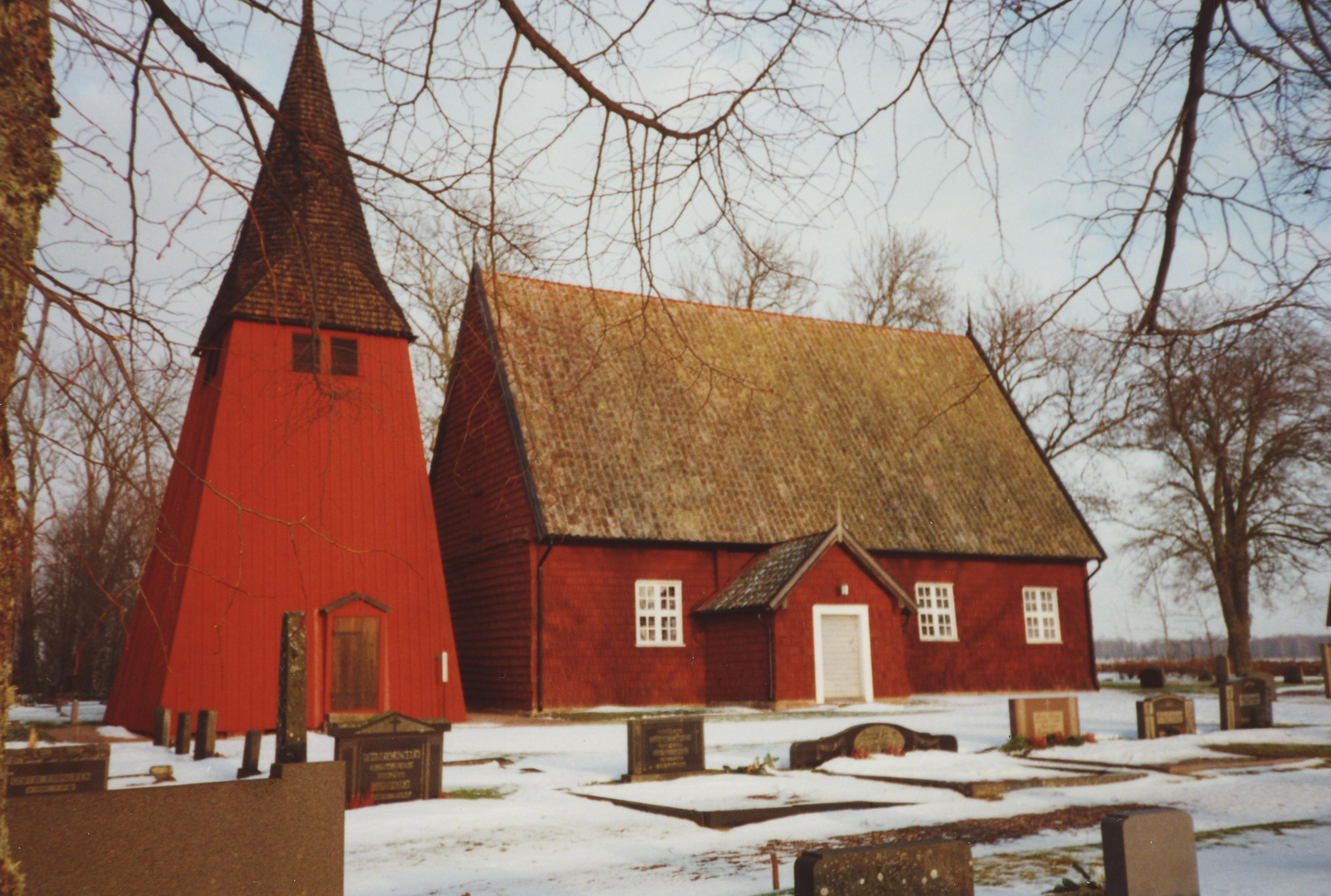 Bredsäters kyrka